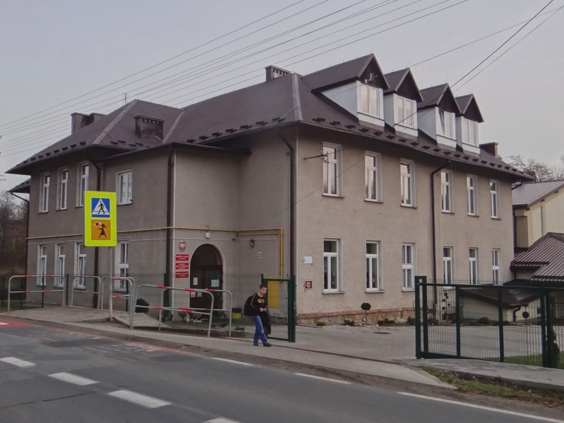 Szkoła w Tymowej